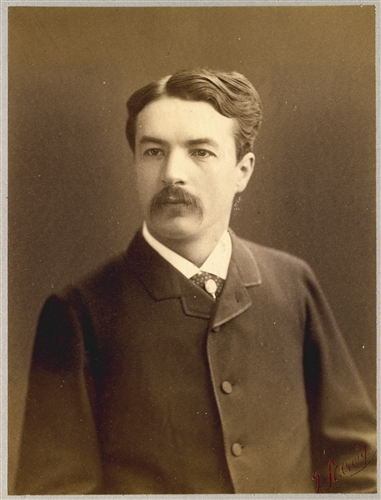 Edouard Odier. Cette photo fait partie d'un album conservé dans l'ancien fonds de la Bibliothèque du CICR. Portraits des Premiers Adeptes de la Croix-Rouge, Vol. I (cote AF 681). Dans l'album la photo fait partie de la section: Genève et Suisse, Comité international.